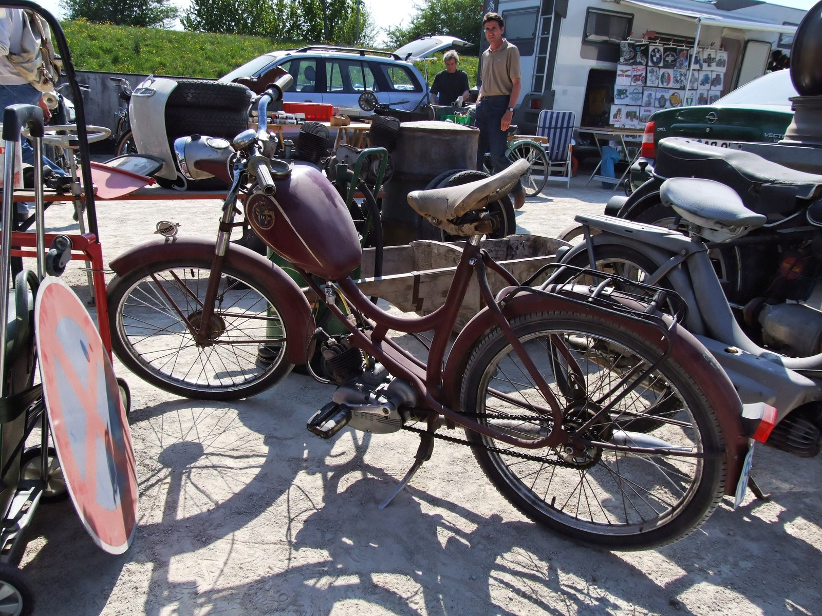 Quelle: selbst fotografiert, 04/2007 Fotograf: Späth Chr.